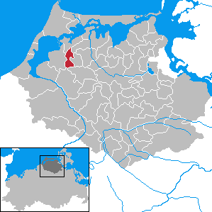 Bartelshagen II b. Barth in Mecklenburg-Vorpommern - District Nordvorpommern